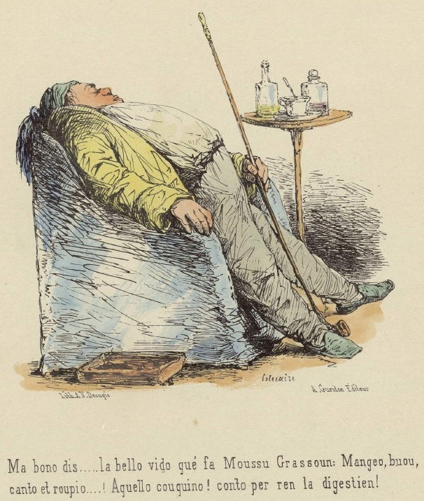 dessenh de Peire letuaire